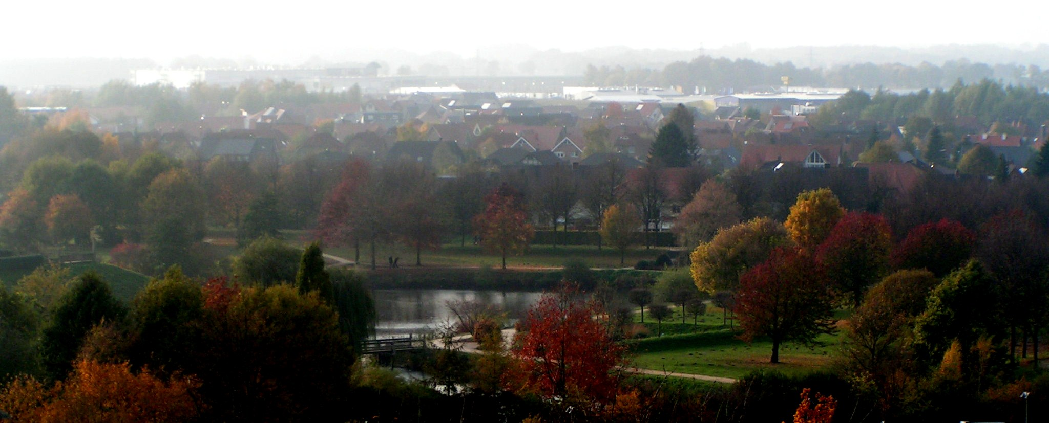 Zitallenpark Vechta